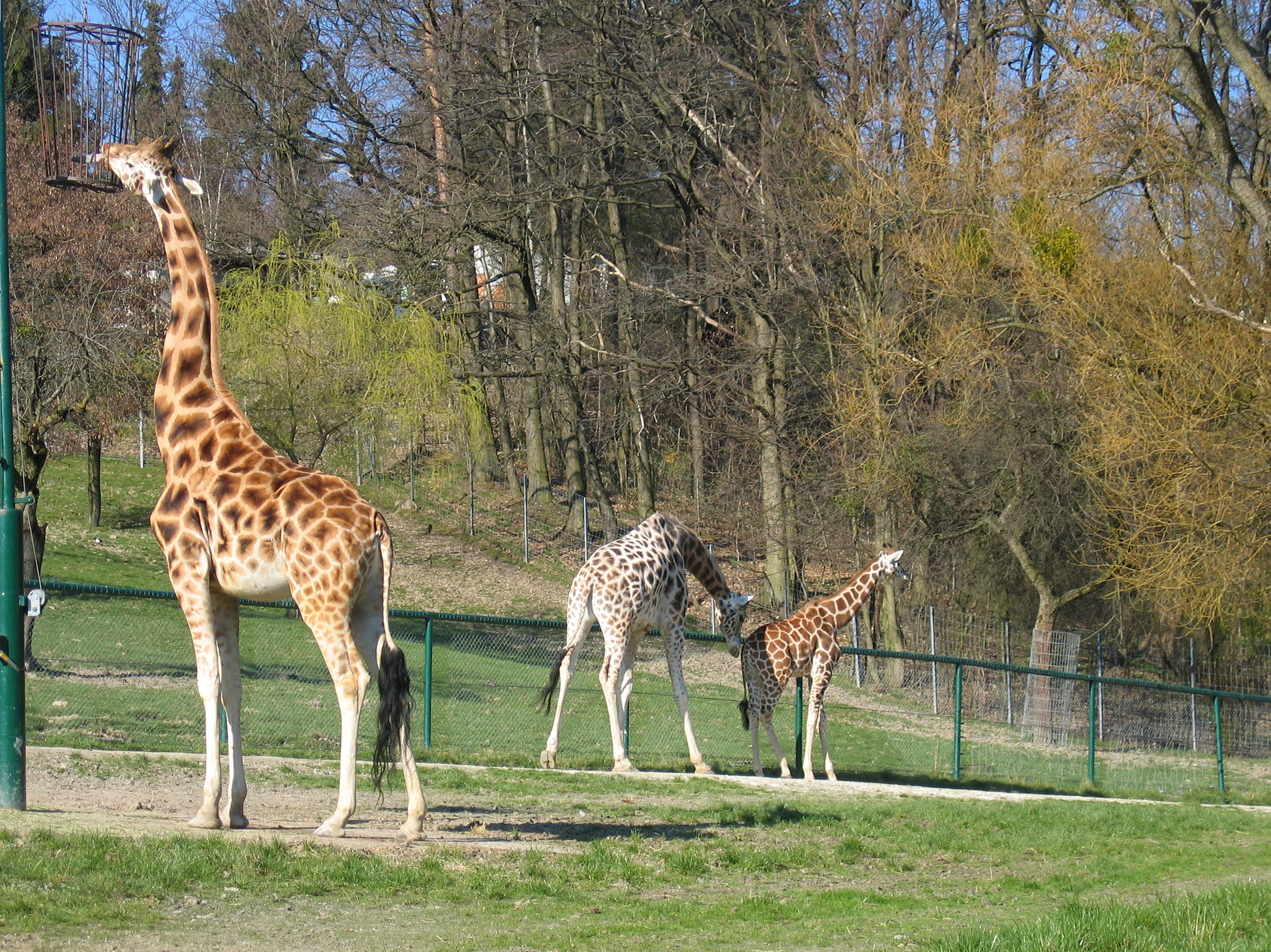 Giraffengehege im Opelzoo - großzügige Freigehege, Hanglage Genehmigung: siehe unten